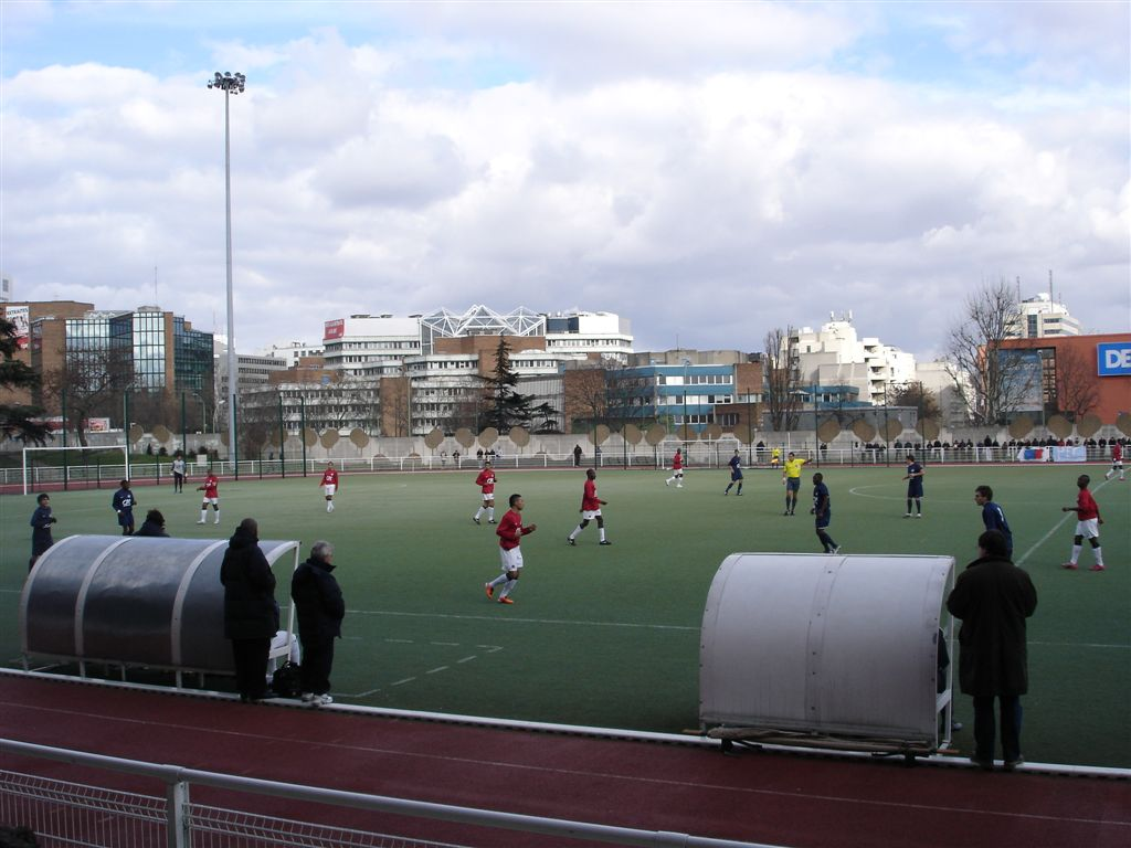 Match Paris FC - PSG en coupe Gambardella 2011 au Stade Maryse Hilsz